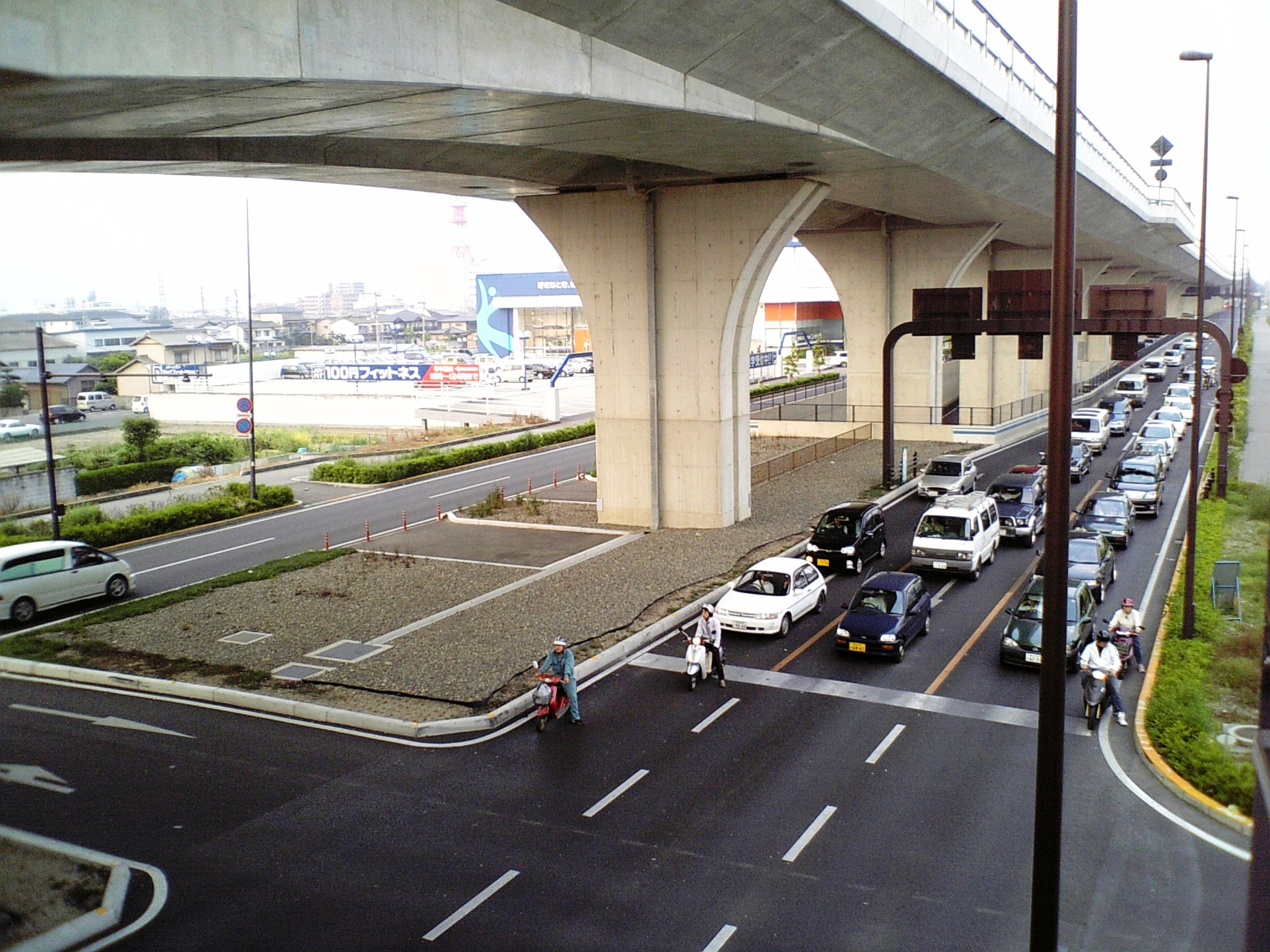 Takamatsu higashi bypass Route11, Takamatsu City, Kagawa Prefecture, Japan.